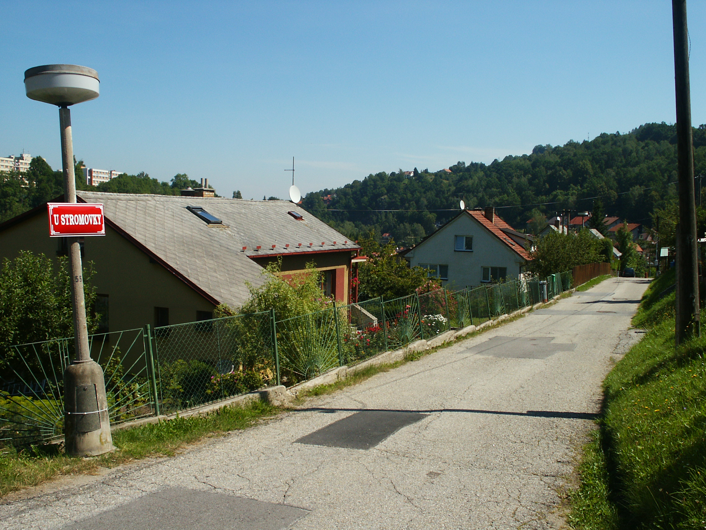 Nové Spolí - střední část (ul. U Stromovky)